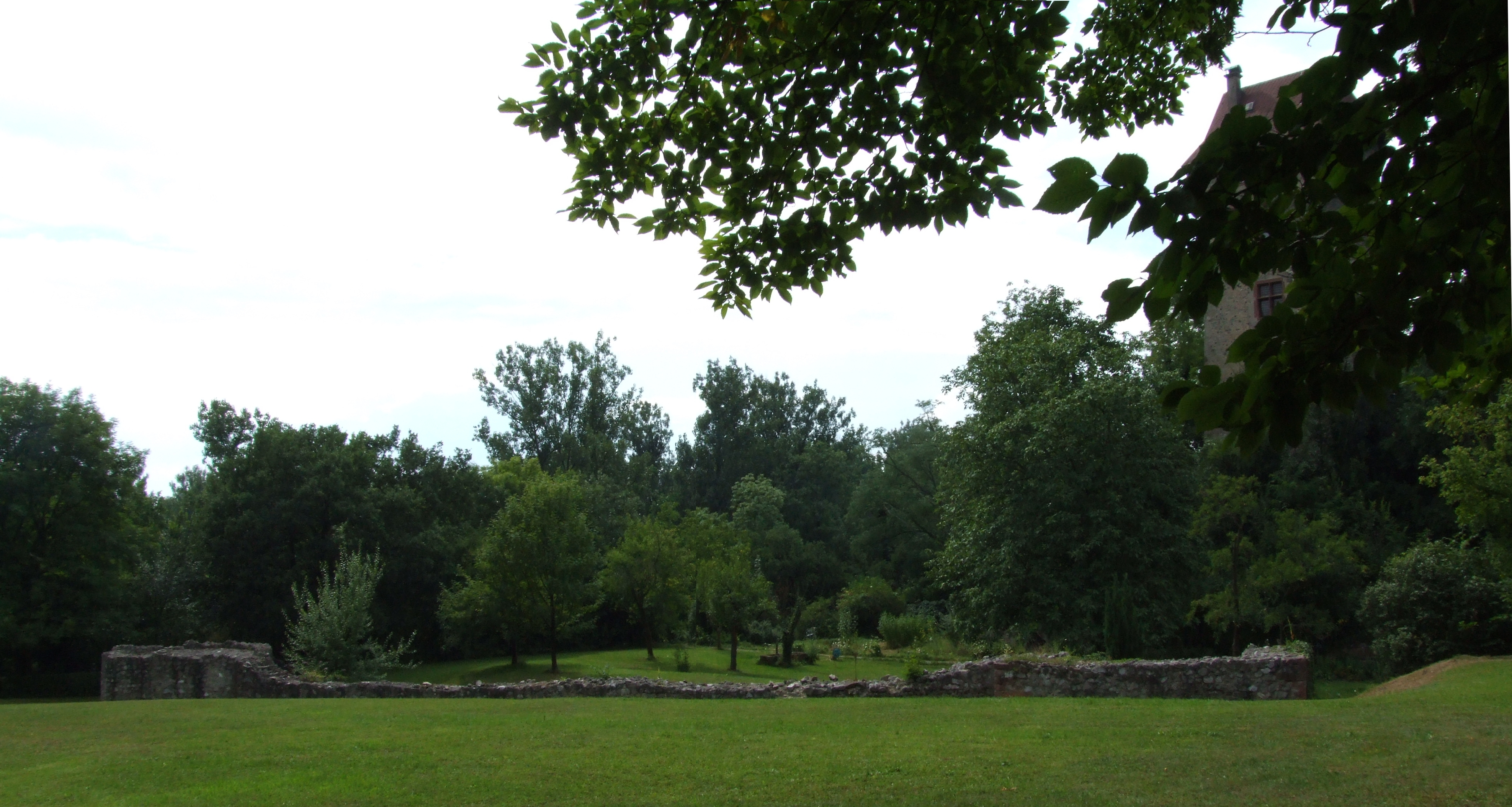 Burg Sponeck von Osten geshen, mit Mauerresten des spätrömischen Kastells